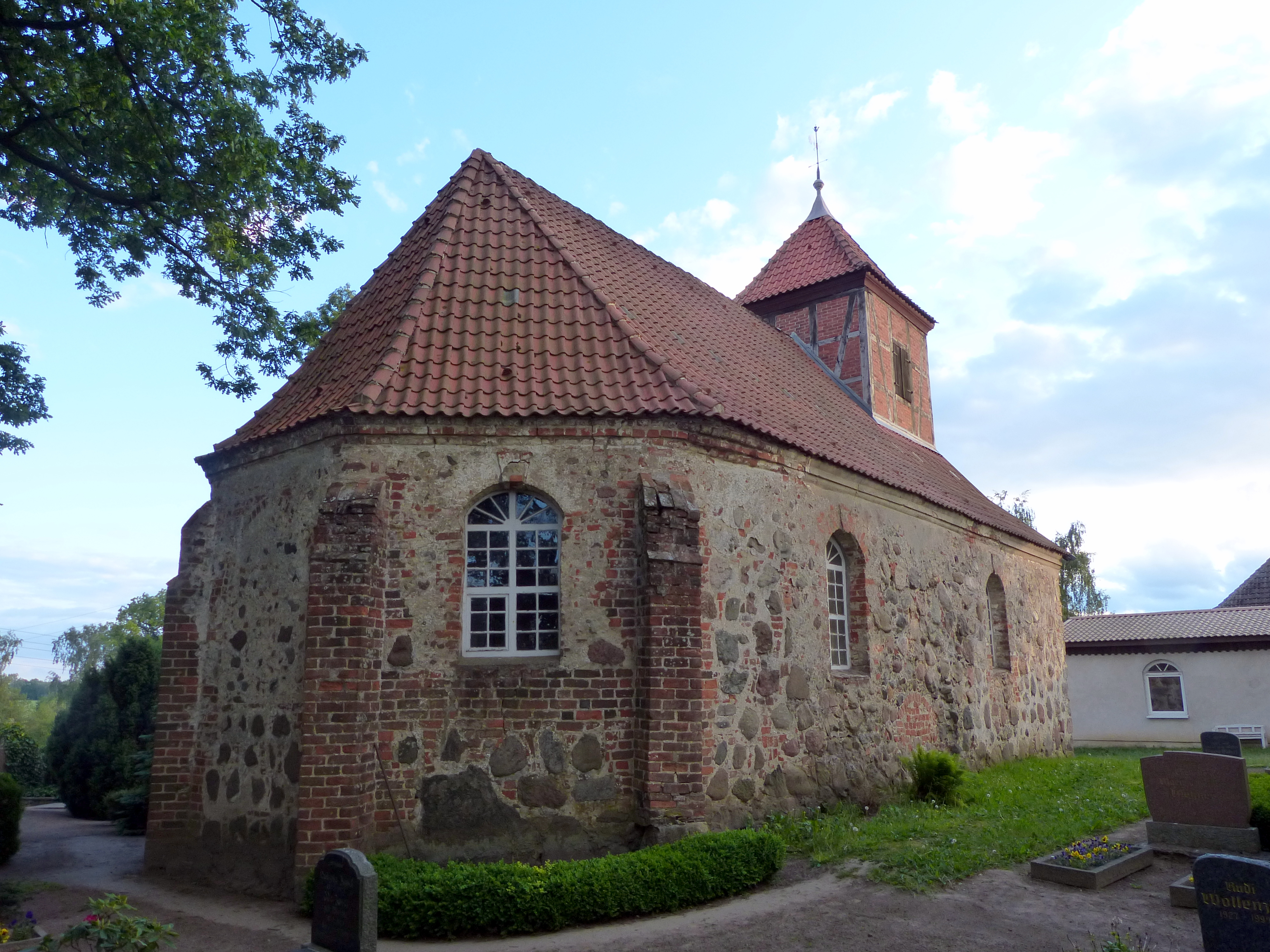 Kirche in Pripsleben, Ansicht von Nordosten